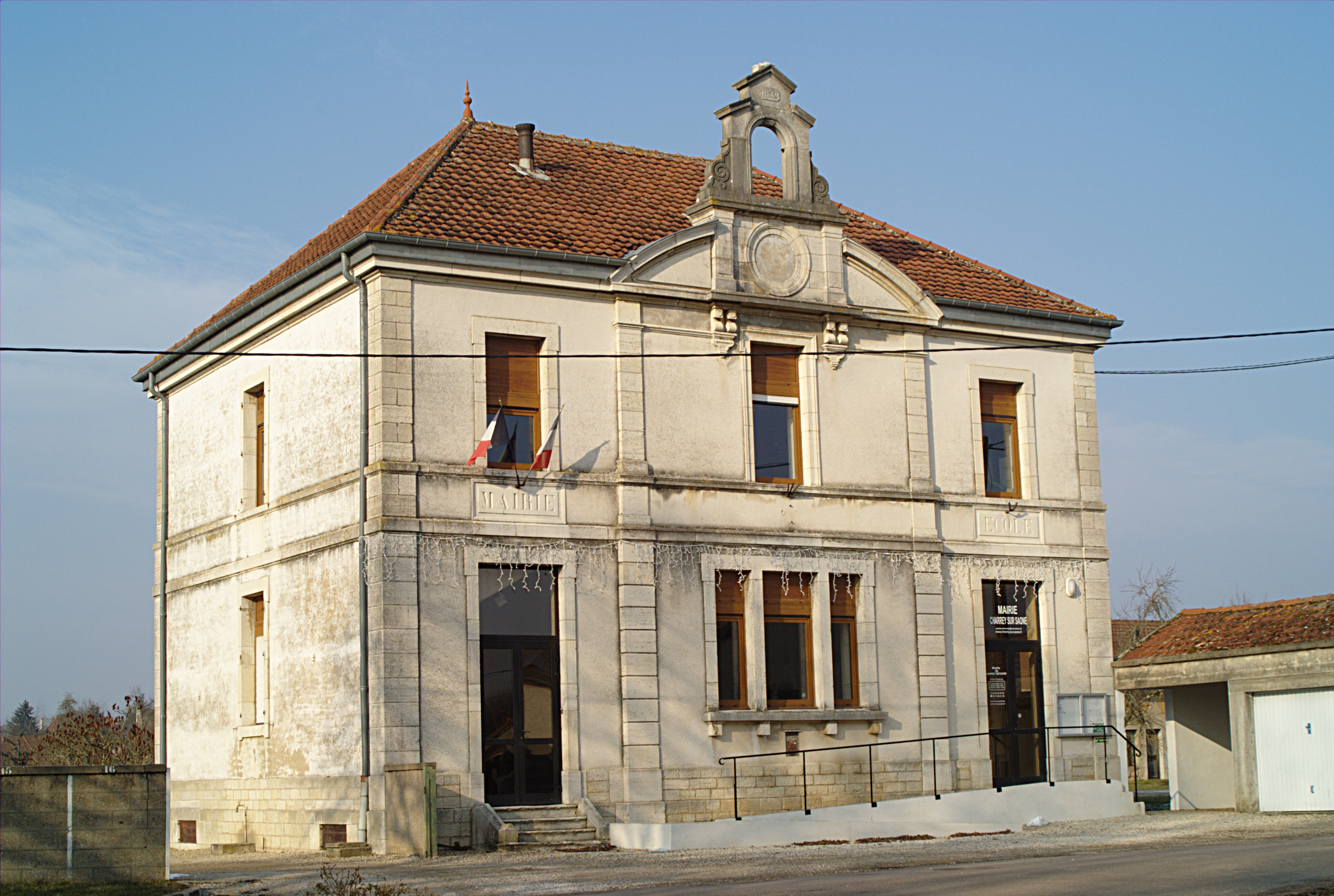 Mairie, école, Charrey-sur-Saône (Côte d'Or, Bourgogne, France)